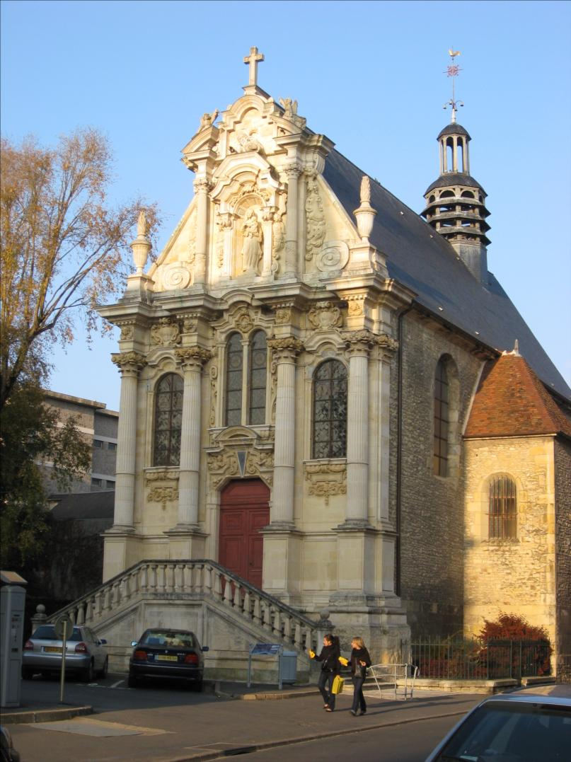 La chapelle Sainte-Marie, ou chapelle de la Visitation de la Sainte Vierge, faisait partie du monastère de la Visitation, dont les bâtiments furent construits de 1623 à 1634.